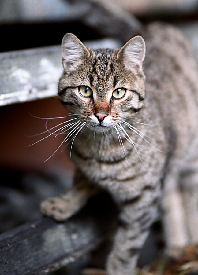 Beispiel von geringer Tiefenschärfe (Brennweite 100mm, Blendenzahl 2,0)